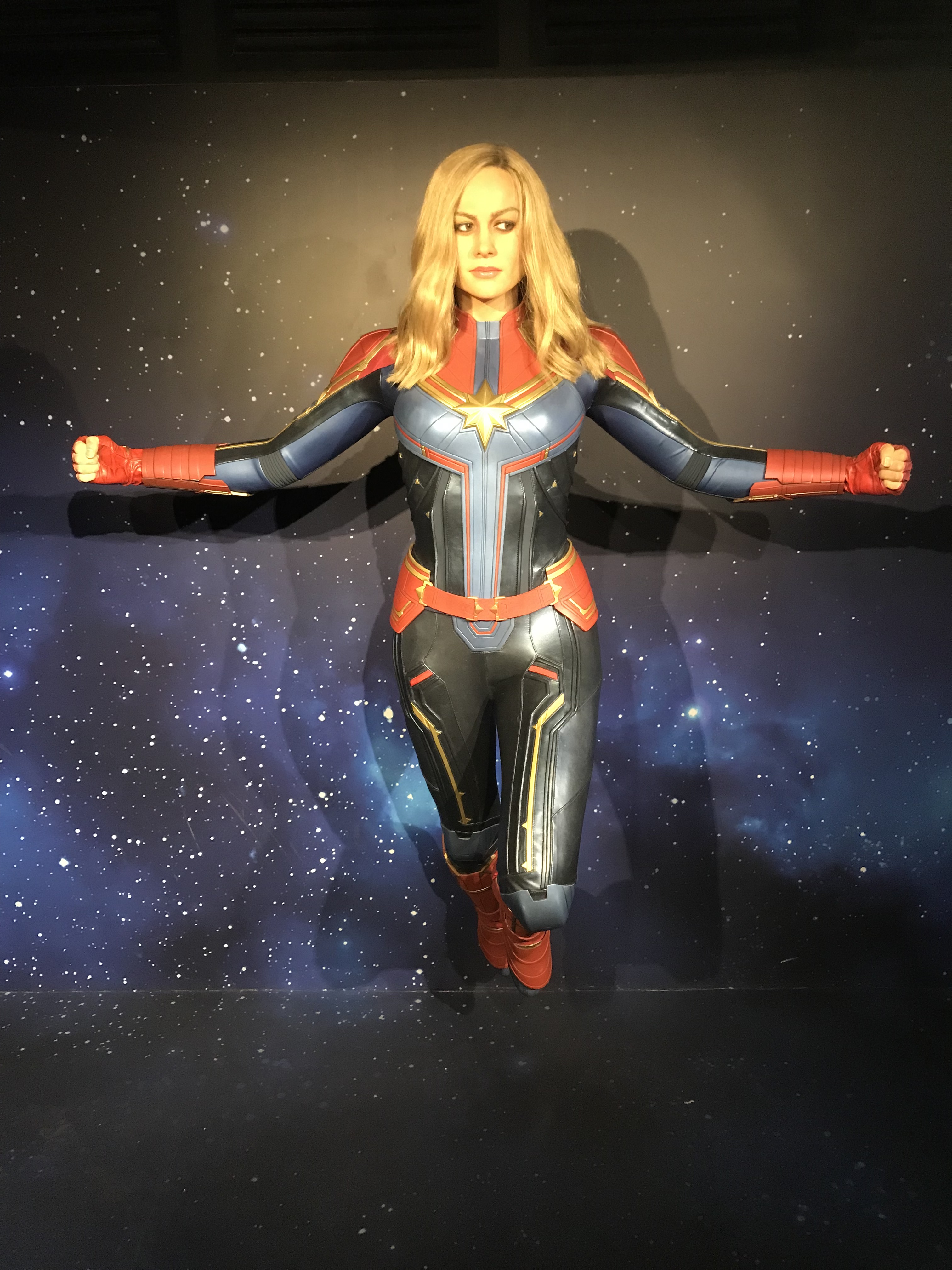 Captain Marvel at Madame Tussauds London, July 17, 2019.